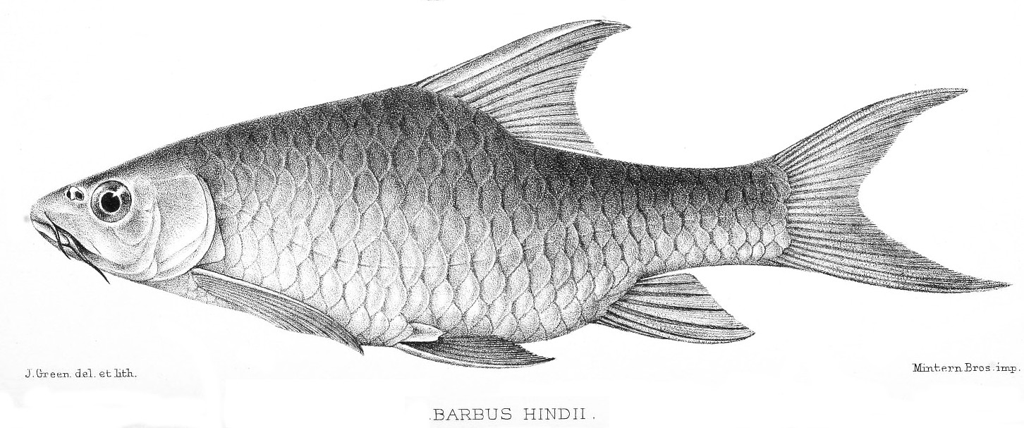 Barbus oxyrhynchus